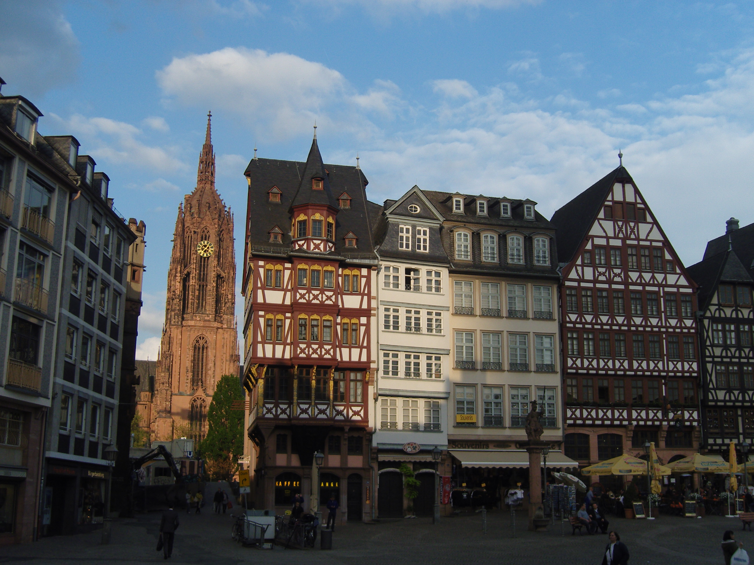 Denkmalgeschützte Häuser am Römerberg in Frankfurt am MainThis is a photograph of an architectural monument.